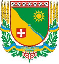 Герб Кодымского района Одесской области